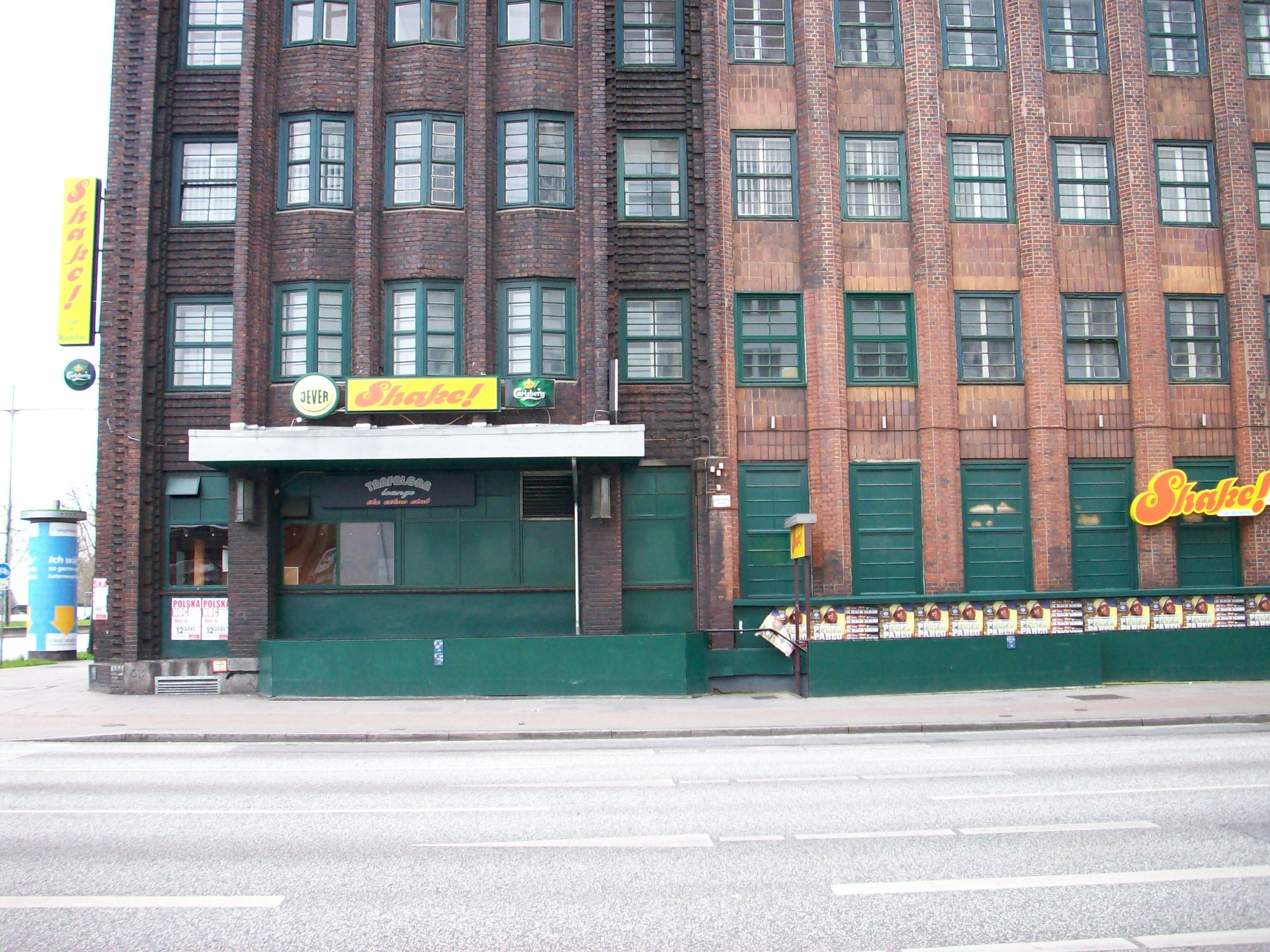 Club "Shake" (Shake! Events GmbH) in der Nordkanalstraße/Ecke Heidenkampsweg, Hamburg-Hammerbrook. This is a photograph of an architectural monument.